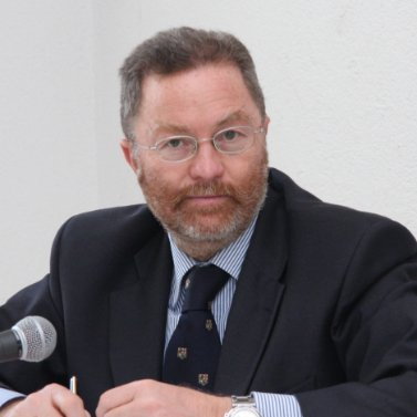 Nato a Roma nel 1956